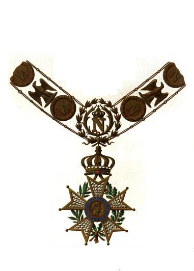 Grand collier de la Légion d'Honneur